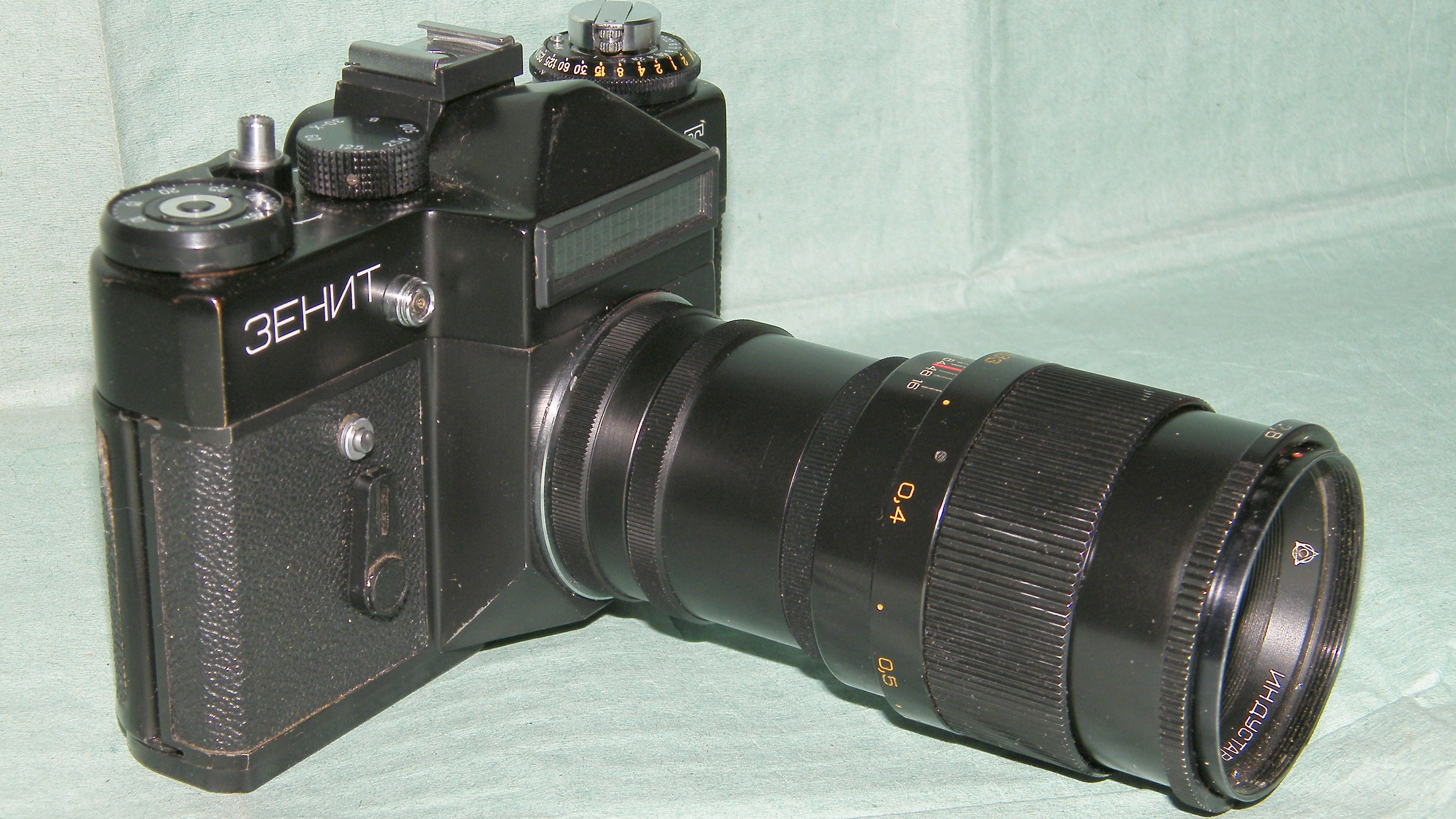 Использование удлинительных колец при макросъемке. Фотоаппарат ЗЕНИТ-ЕТ, три удлинительных кольца толщиной 7, 14 и 28 мм и объектив ИНДУСТАР-61 Л/З